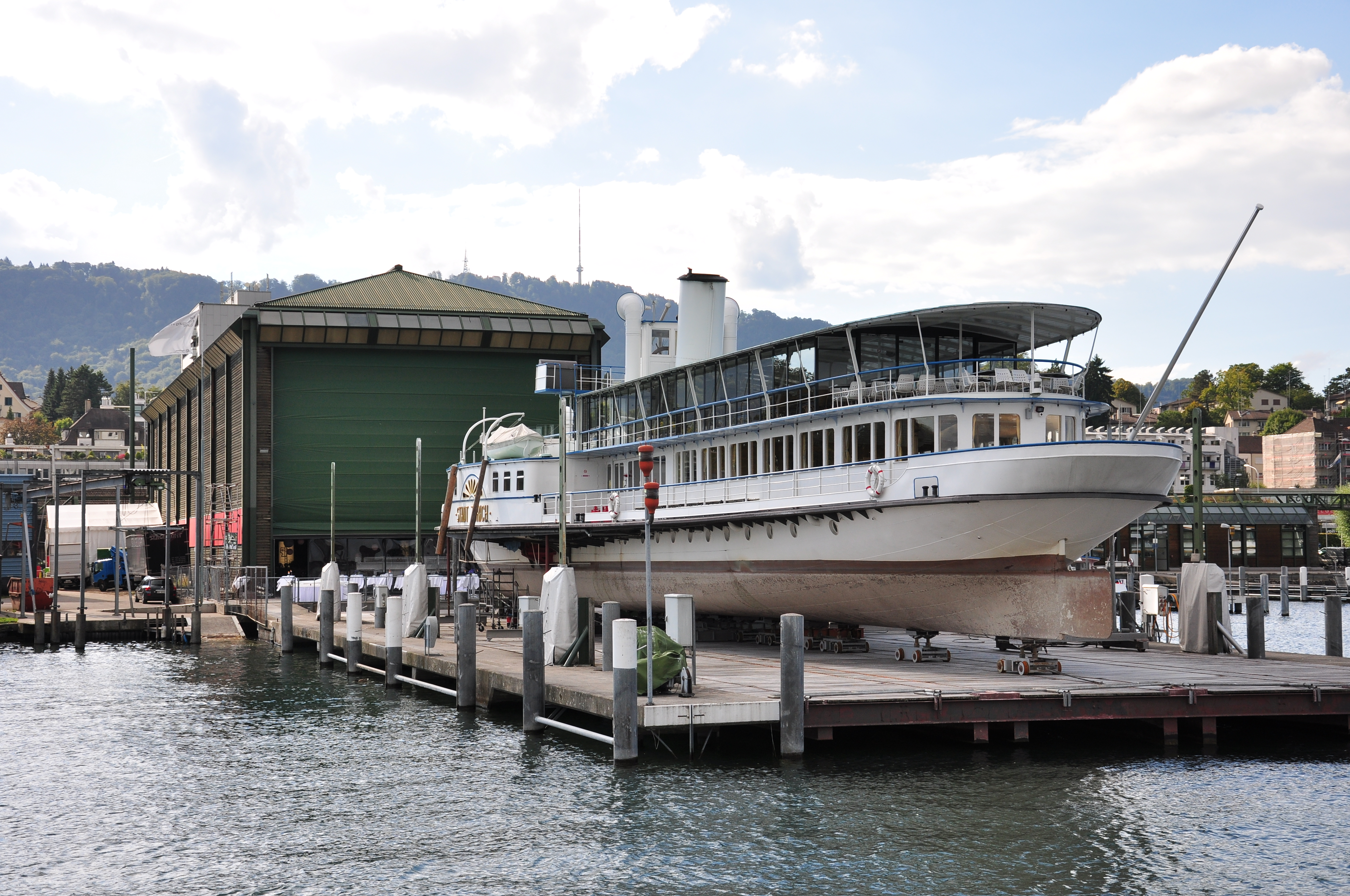 Zürichsee-Schiffahrtsgesellschaft (ZSG) paddle steamship Stadt Zürich at the ZSG shipyard in Zürich-Wollishofen, as seen from paddle steamship Stadt Rapperswil on Zürichsee towards Bürkliplatz in Zürich (Switzerland)